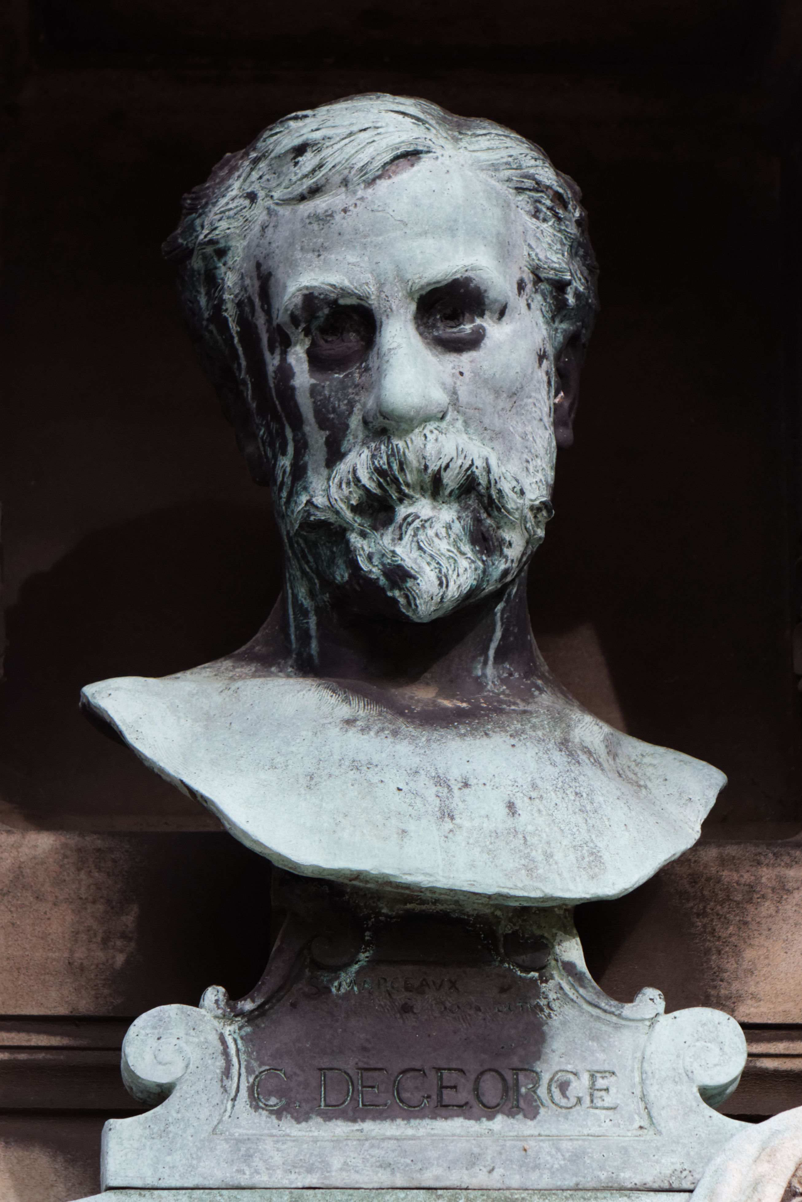 Tombe orné d'un buste en bronze signé Saint-Marceaux, à mon ami.